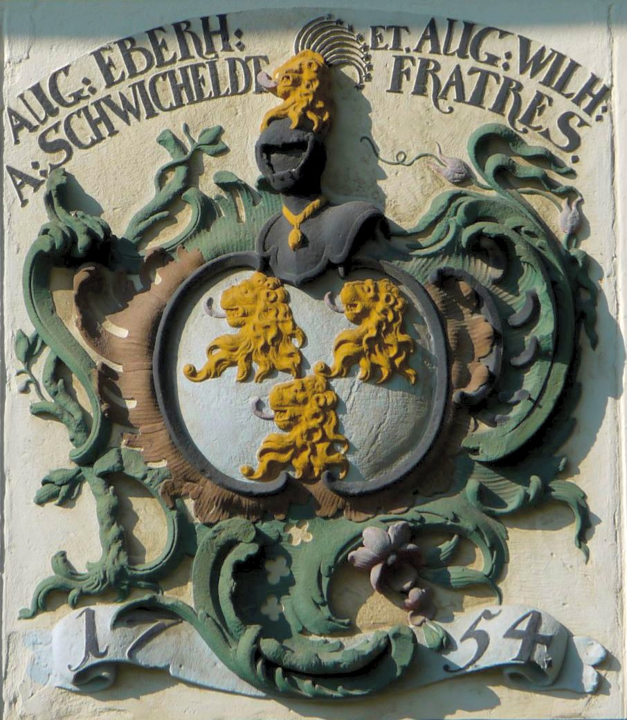 Darstellung des Wappens der Familie von Schwicheldt von 1754 am Gutshof in Salzgitter-Flachstöckheim